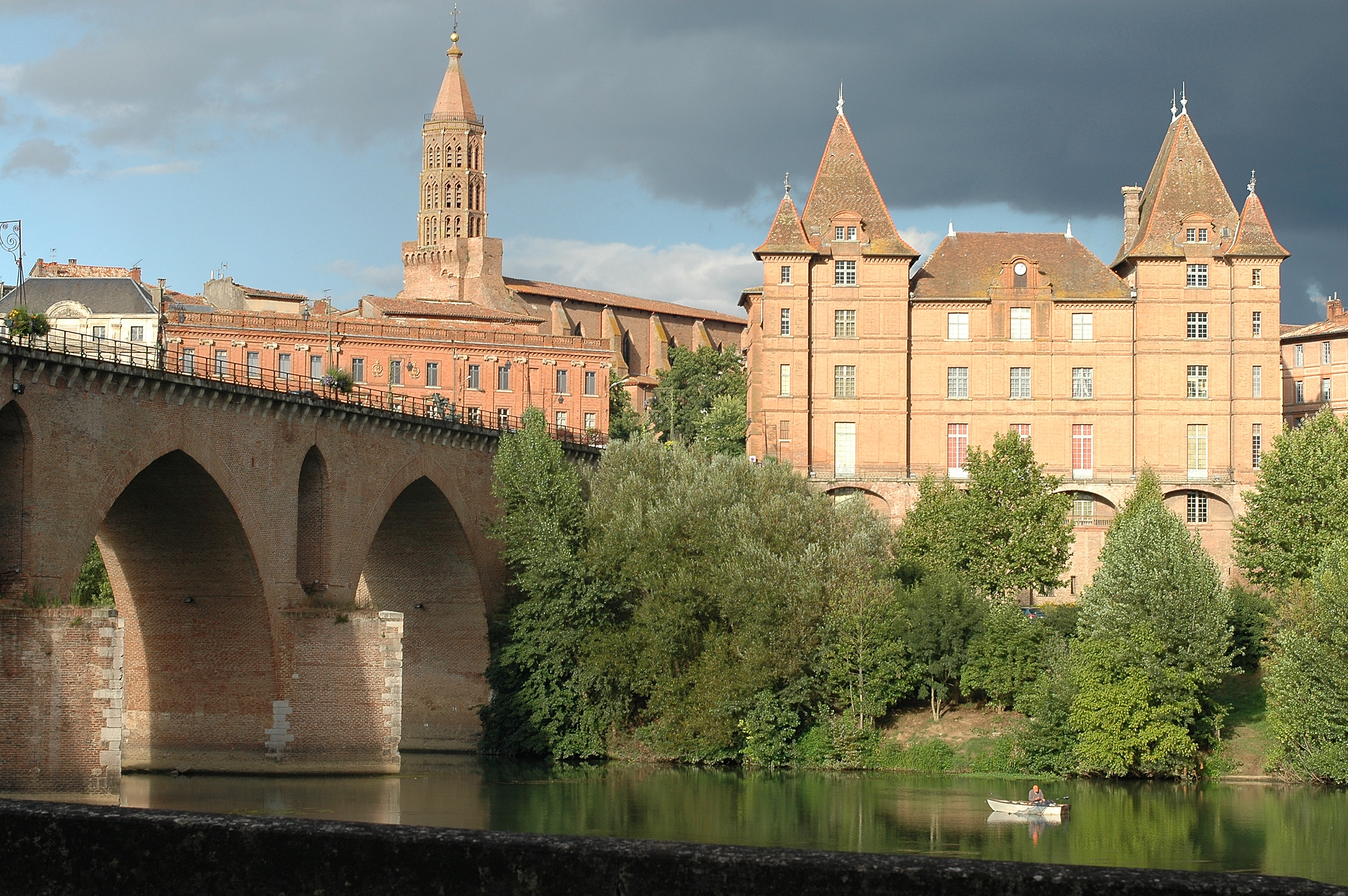 Le pont vieux de Montauban sur la rivière Tarn ; vue amont. En arrière plan : le clocher de l'église St Jacques et le musée Ingres (ancien palais de évêques).